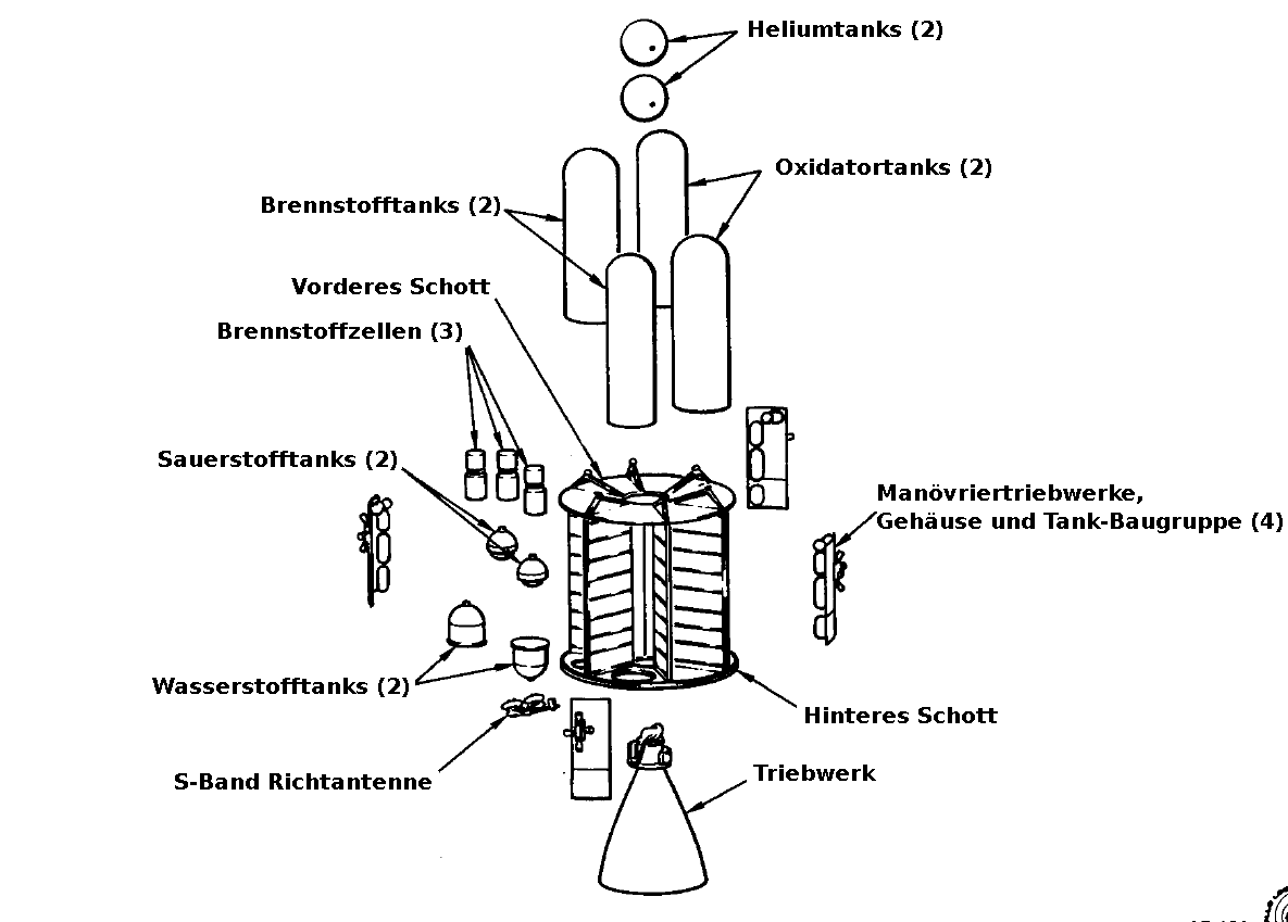 Explosionsdarstellung des Apollo Service-Moduls. Das Bild stammt aus einem Apollo Trainingshandbuch, einer NASA-Publikation, und wurde von mir mit deutschen Anmerkungen versehen.